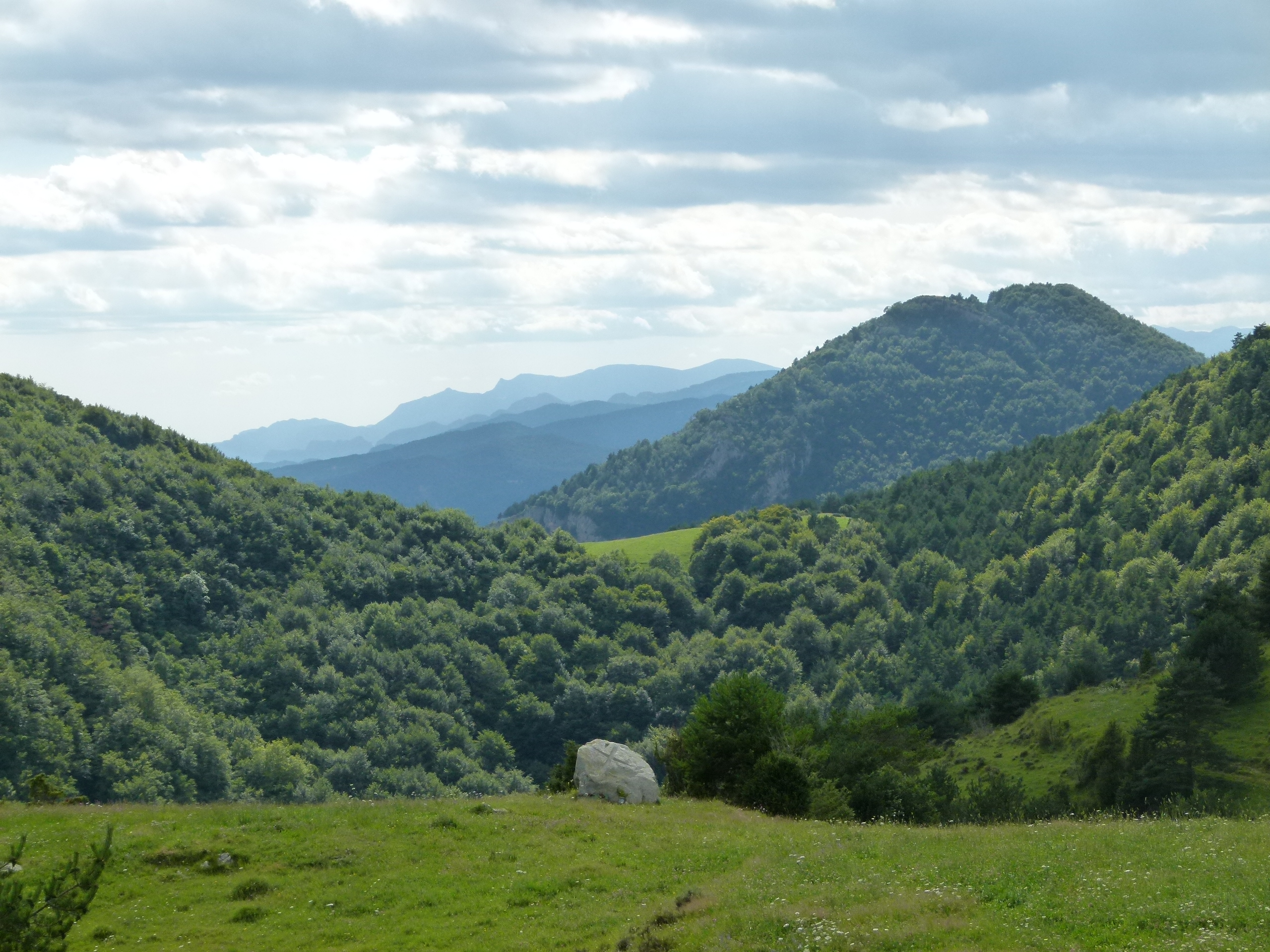 Monòlit en record de Lluís Maria Xirinacs al pla de Can Pegot